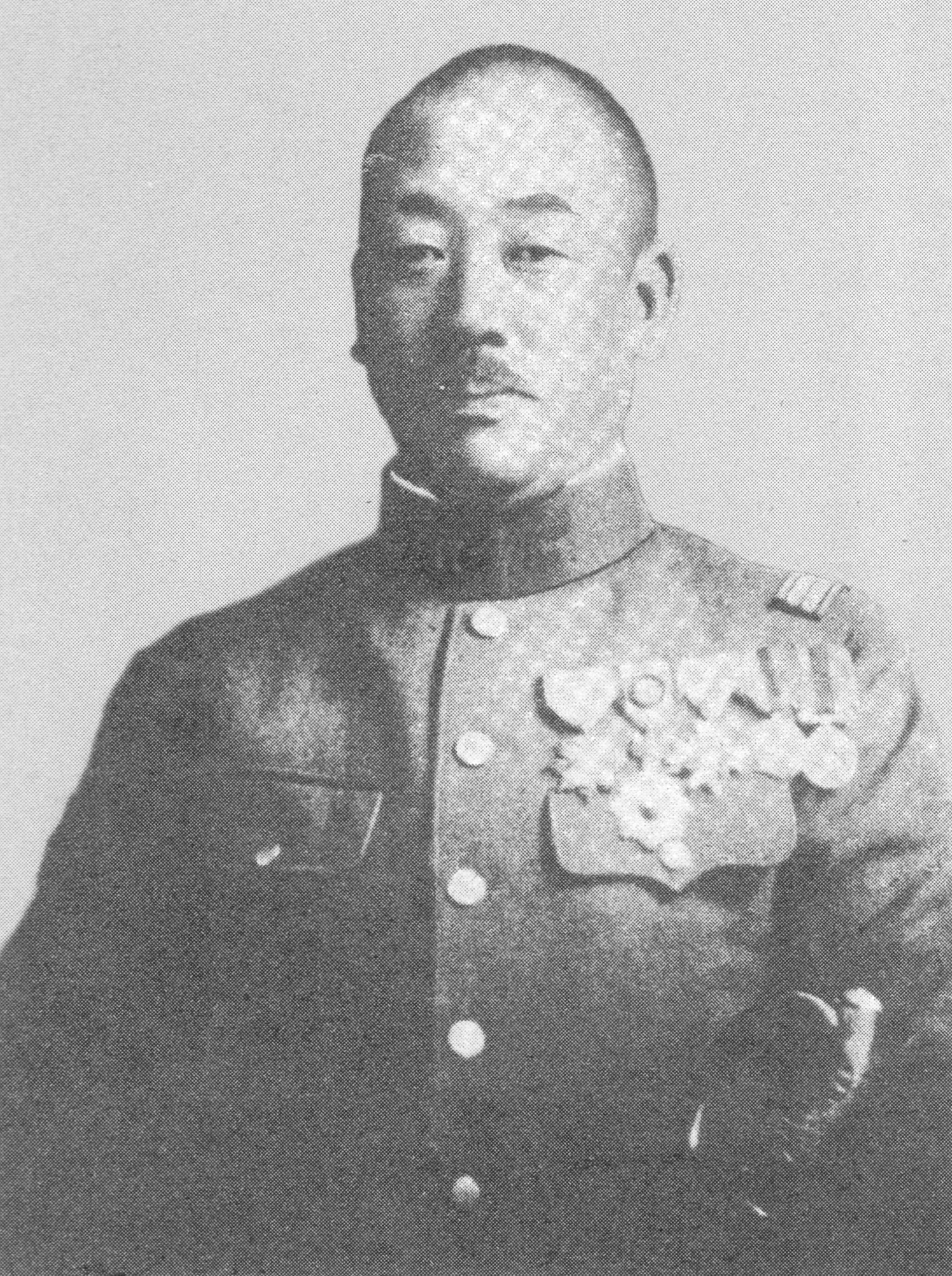 歩兵第44聯隊長時代